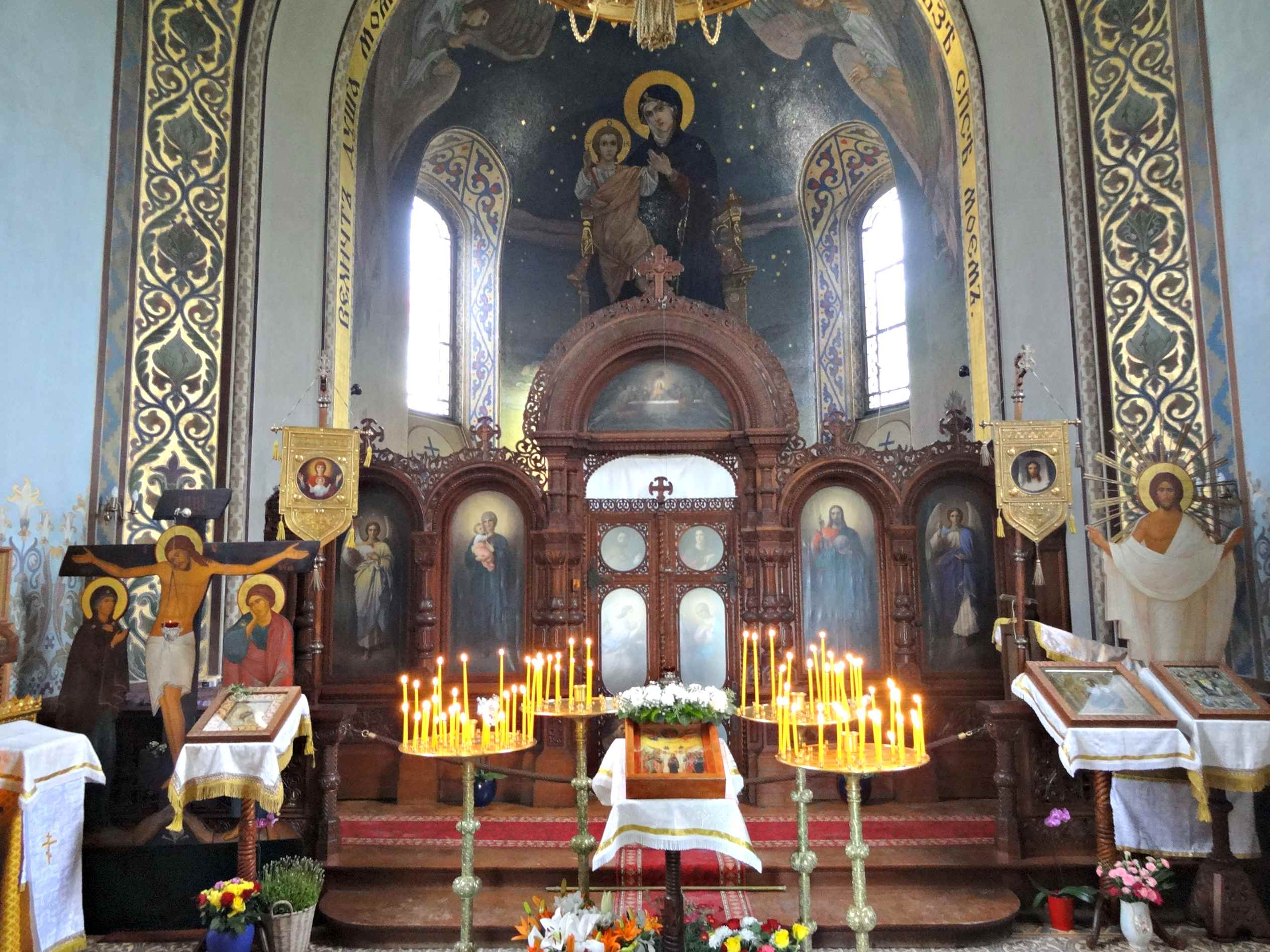 Russische Kapelle Mathildenhöhe